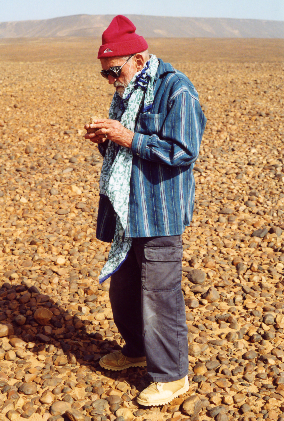 Théodore Monod, Adrar de Mauritanie (Oued Akerdil), Décembre 1998